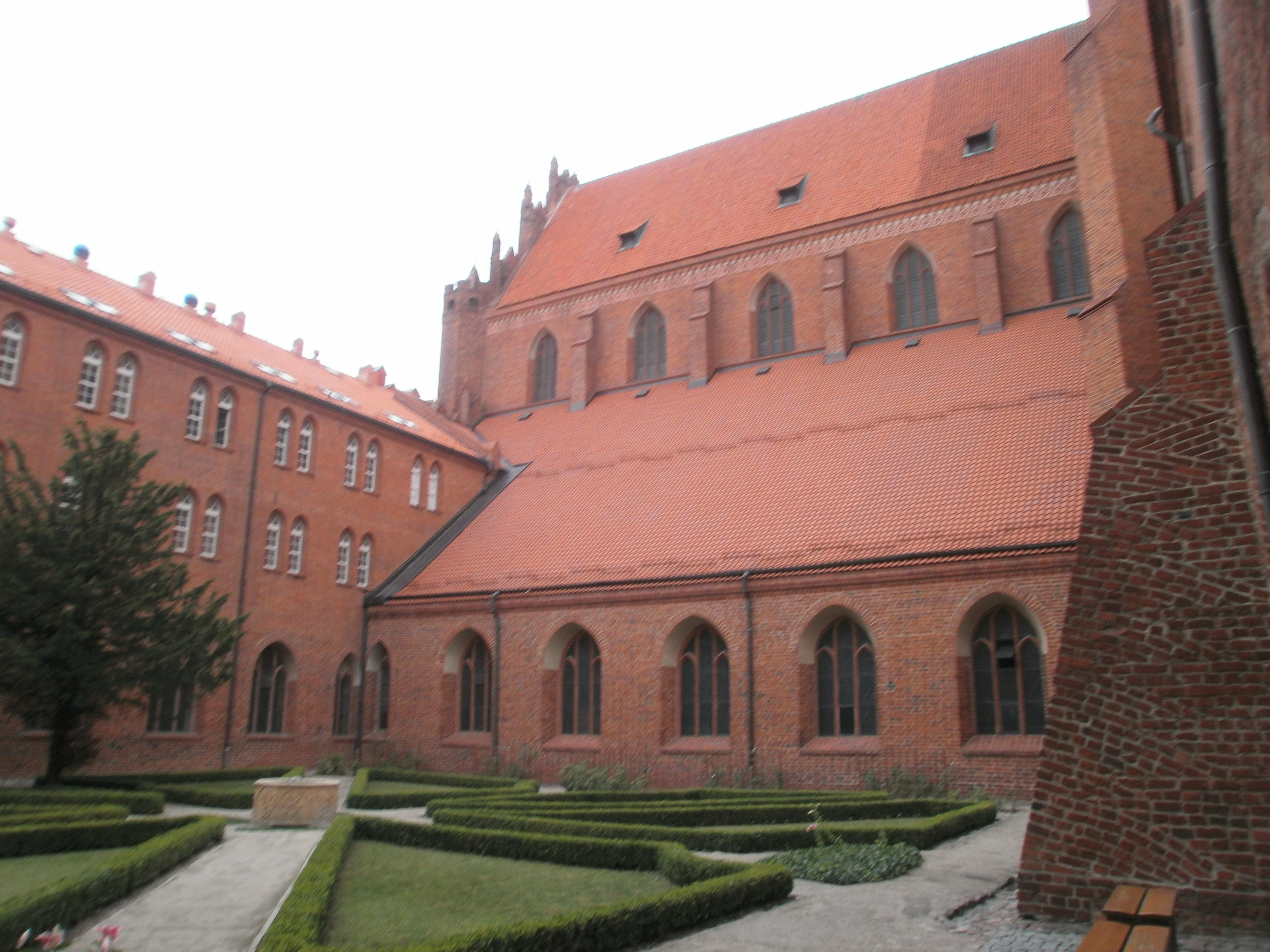 zespół klasztoru cystersów: ( Bazylika Katedralna p.w. Wniebowzięcia NMP; klasztor ; kaplica p.w.św. Barbary; Wyższe Seminarium Duchowne: / budynek główny, kuchnia, skrzydło zachodnie /; Collegium Marianum; wieża ustępowa; budynek bramny; mały młyn; stajnia przy młynie)